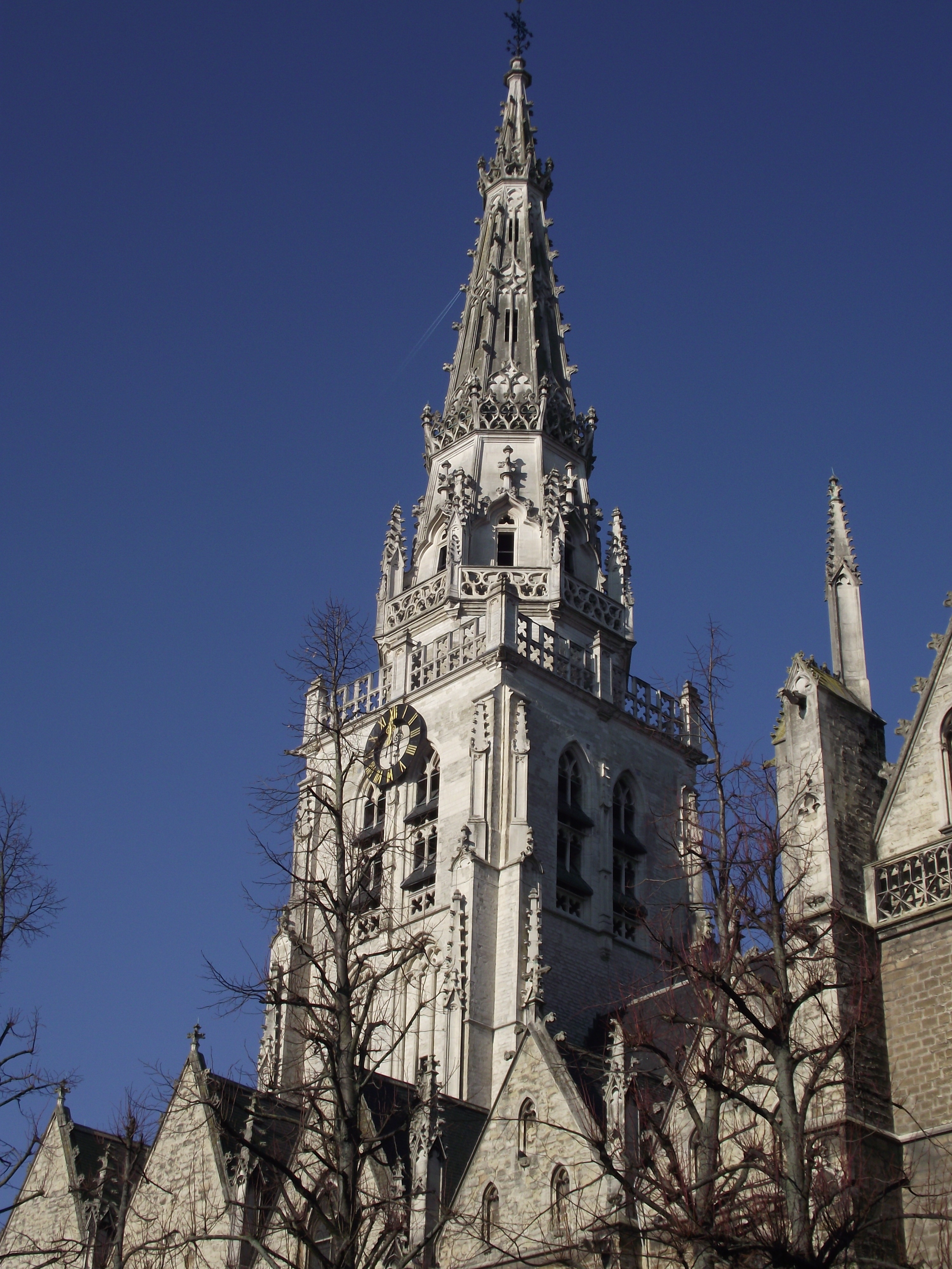 Anderlecht, Collegiata dei Santi Pietro e Guido, 1350-1527